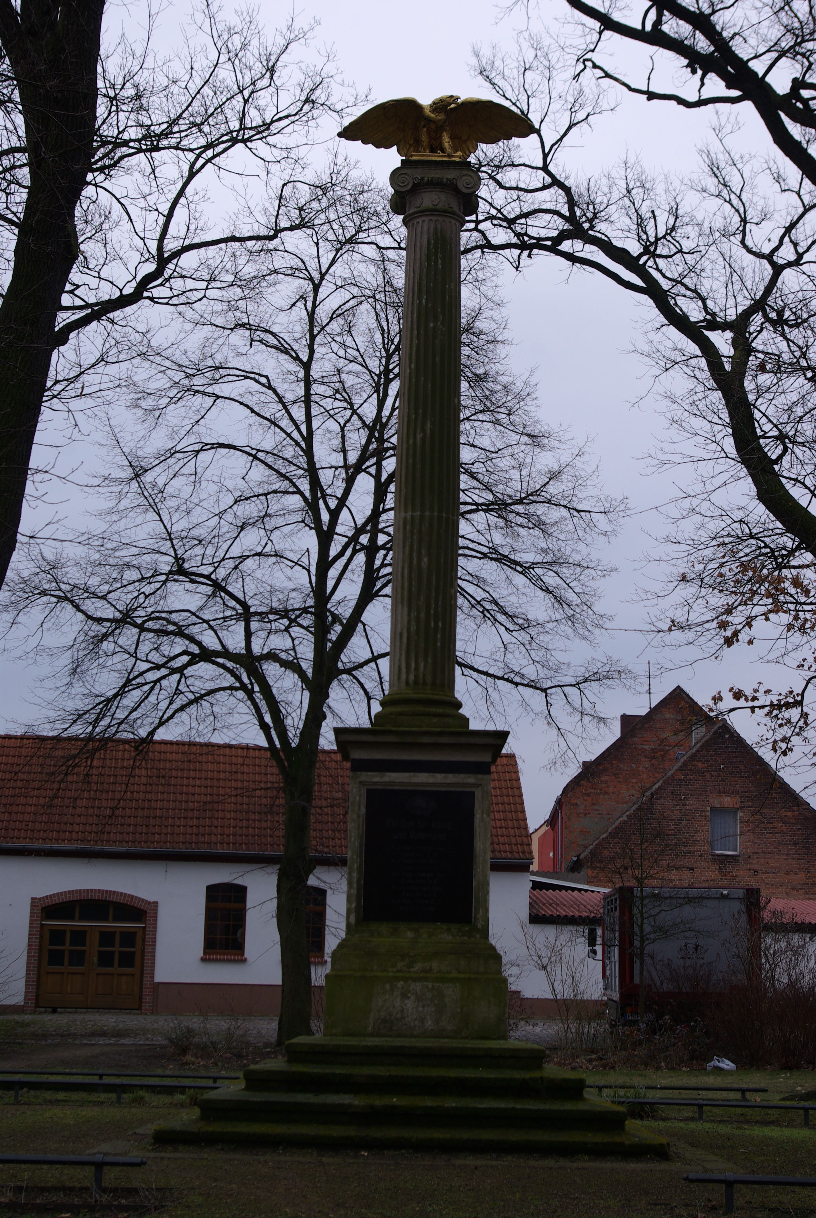 Görzke, Landkreis Potsdam Mittelmark. Das Kriegerdenkmal am Markt (geotags in den exif-daten).